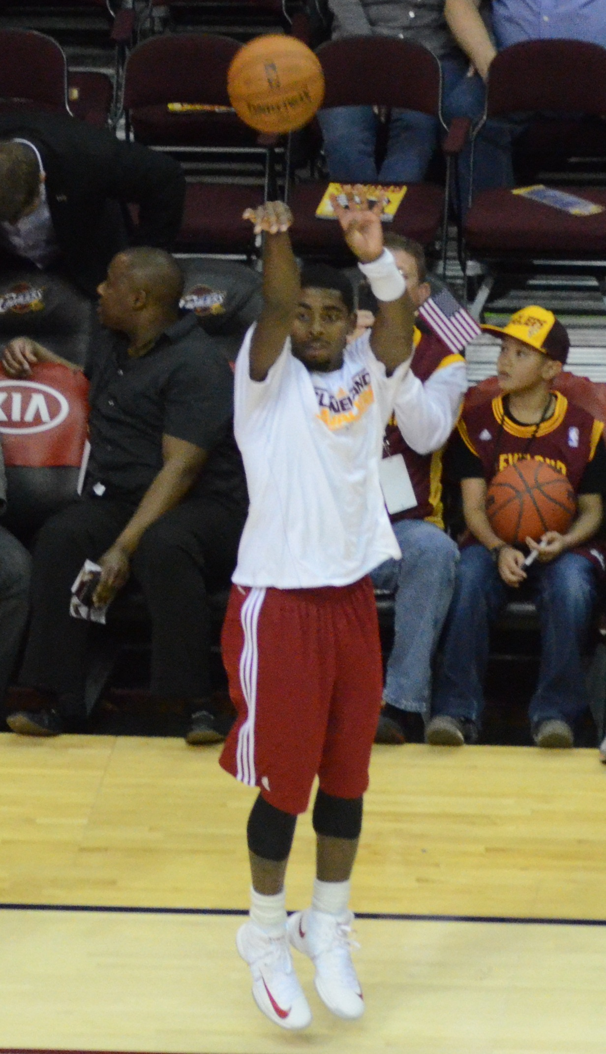 Kyrie Irving